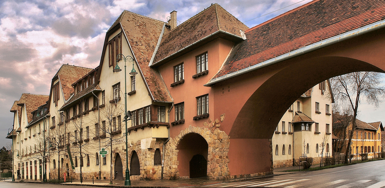 Lakóház (Budapest 19, Kós Károly tér 2.) This is a photo of a monument in Hungary. Identifier: 1270